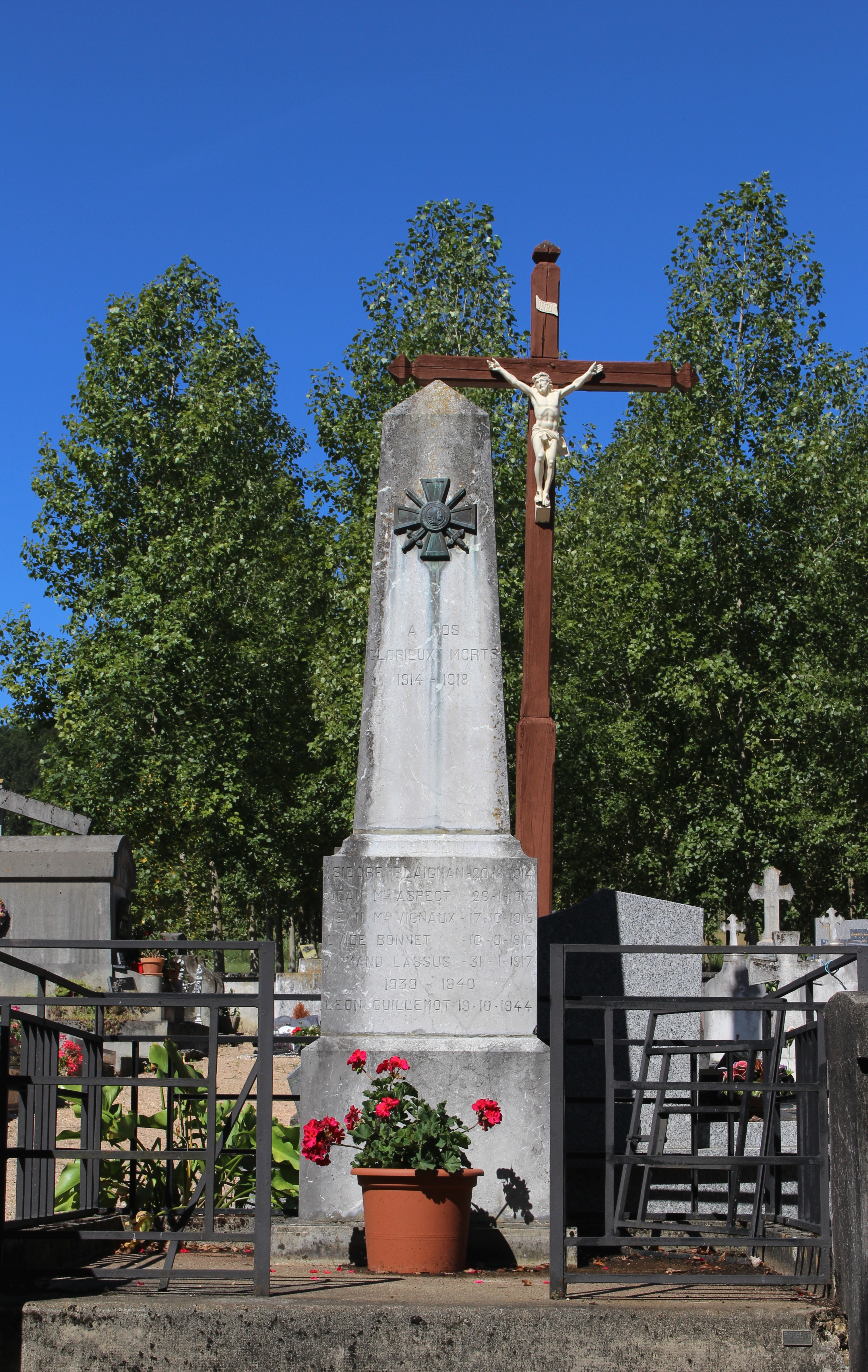 Monument aux morts de Caubous (Hautes-Pyrénées)